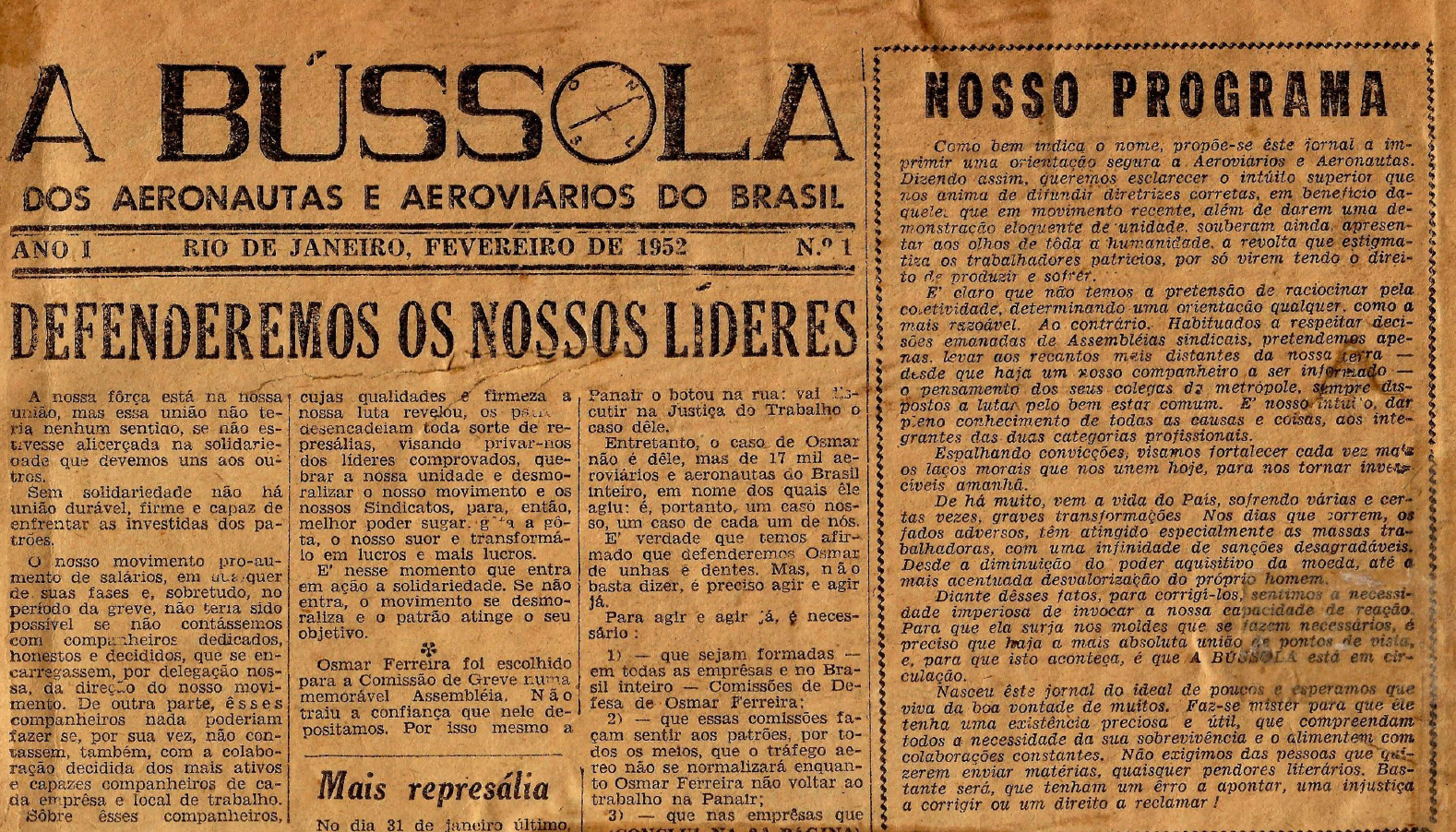 Datado de fevereiro de 1952, o jornal "A Bússola" era o veículo de comunicação das categorias de aeronautas e aeroviários do Brasil.